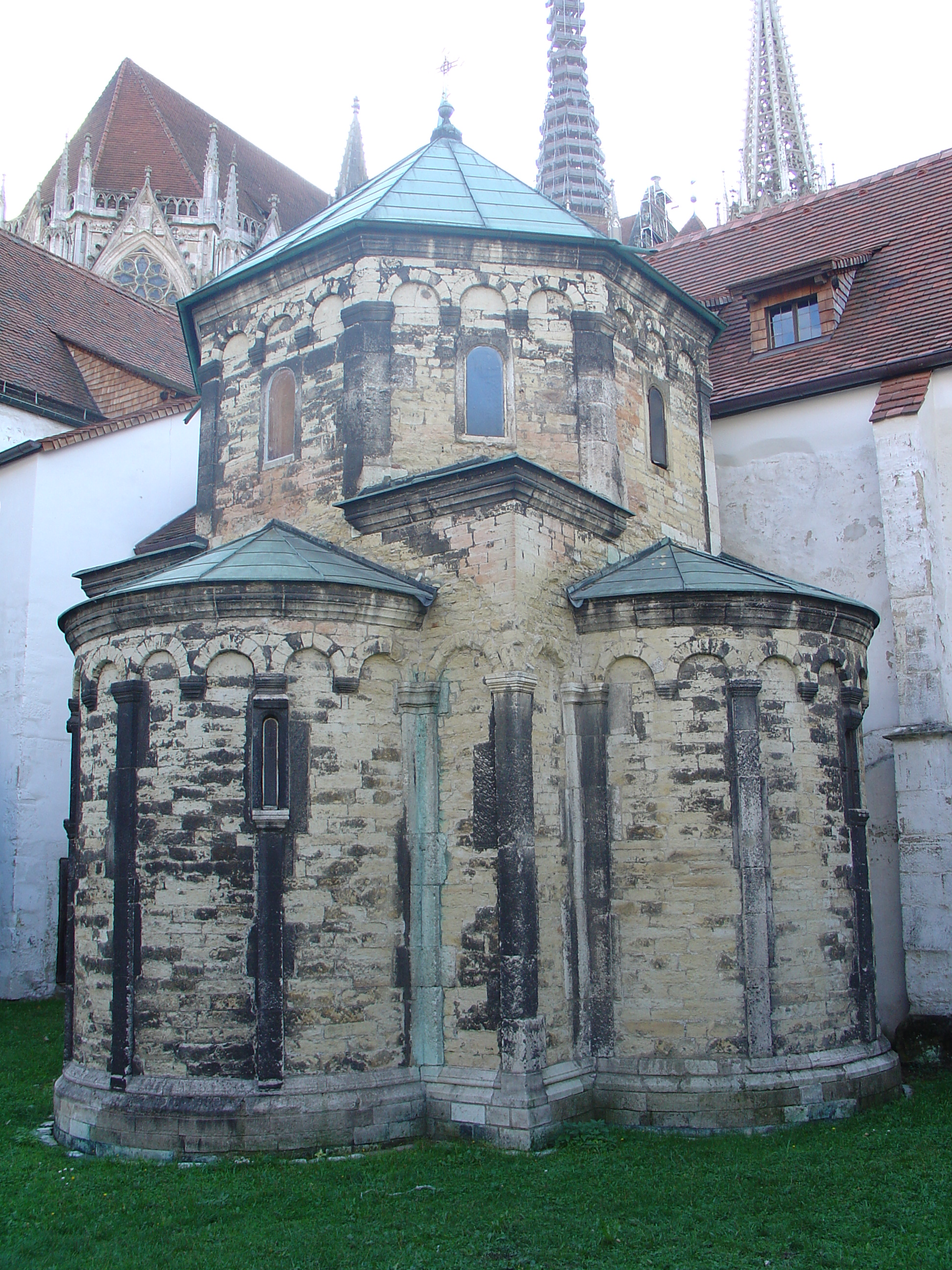 Allerheiligenkapelle Regensburg